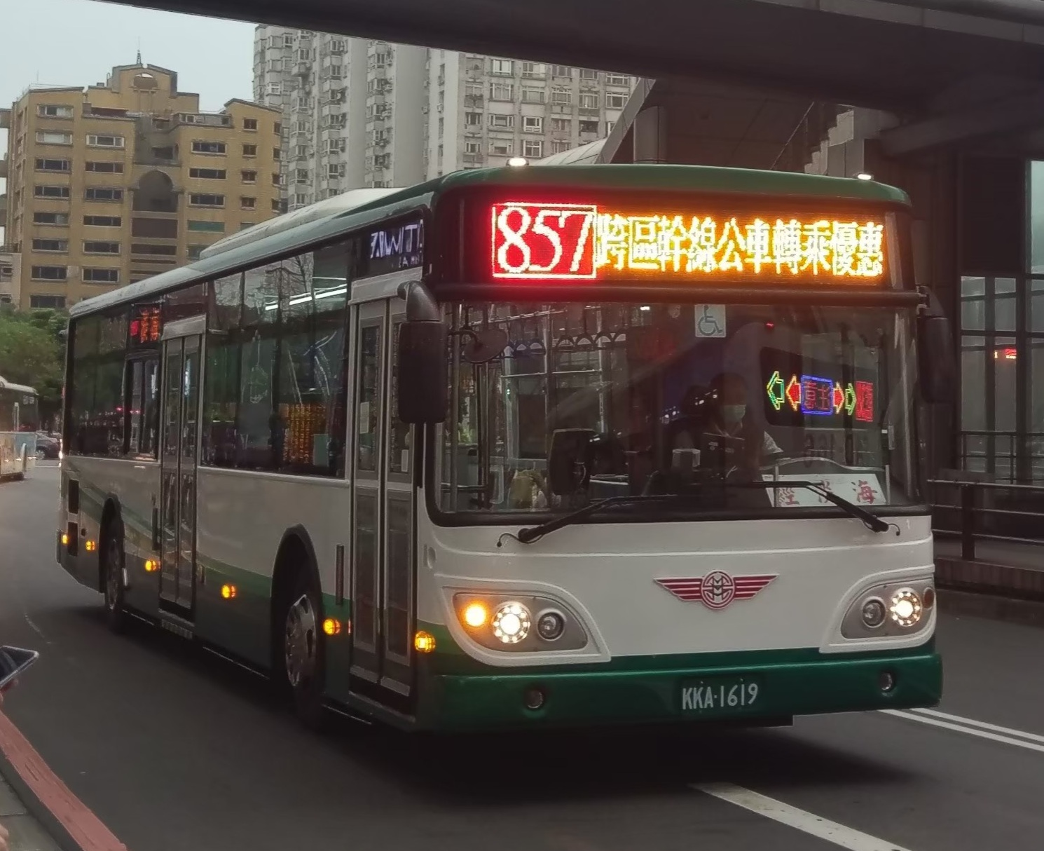 三重客運成運低地板，於板橋公車站拍攝